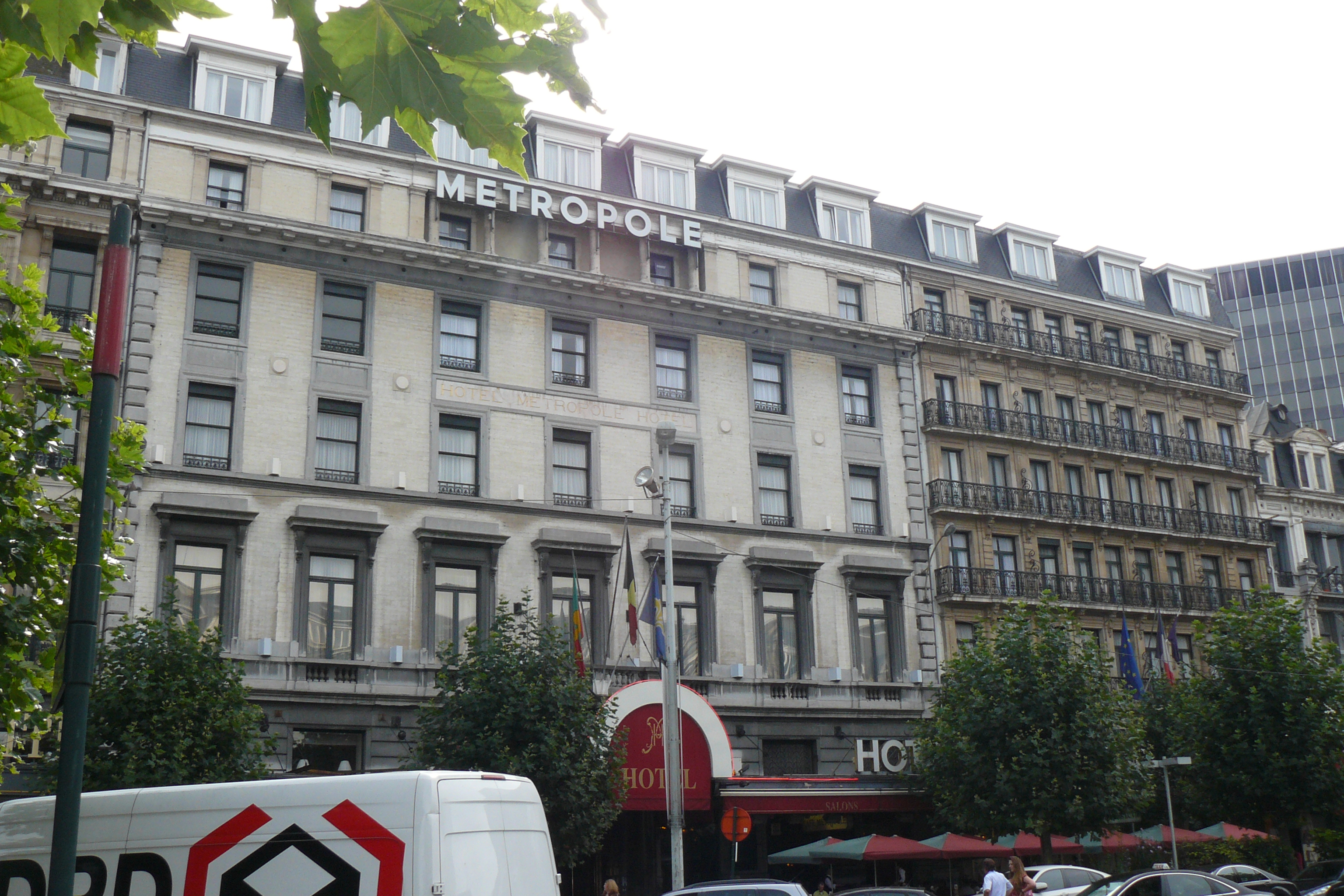 Complexe formé par l'Hôtel Métropole et ses extensions